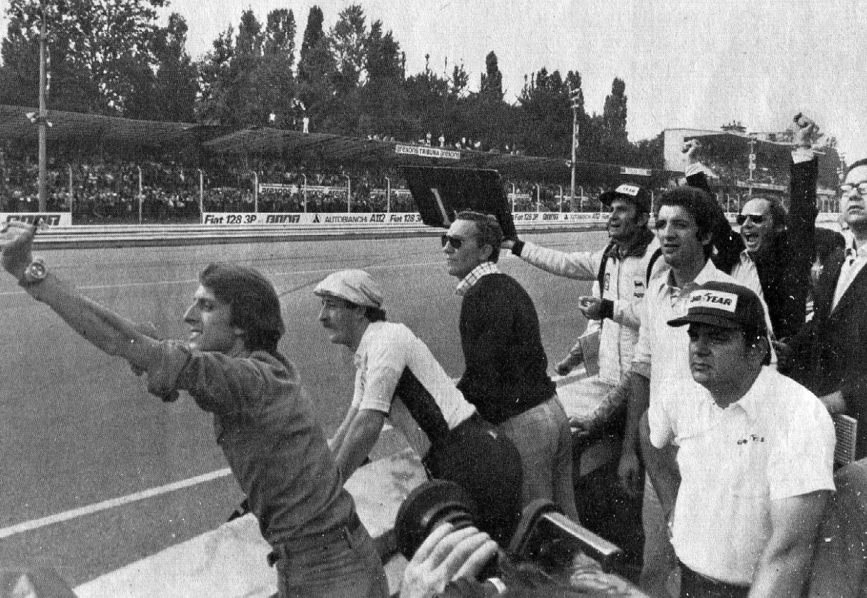 Monza, Autodromo Nazionale, 7 settembre 1975. XLVI Gran Premio d'Italia. Il box della Scuderia Ferrari, a pochi giri dal termine, incita dal muretto il suo pilota, lo svizzero Clay Regazzoni, in testa alla corsa; si riconosce (a sinistra) il team manager della scuderia, Luca Cordero di Montezemolo.Original caption: "Cinquantesimo giro, Regazzoni sbuca dalla parabolica, ed i cartelli sono ormai superflui. Dal box Ferrari si alzano le braccia in segno di vittoria, il gesto di Luca Montezemolo è eloquente."